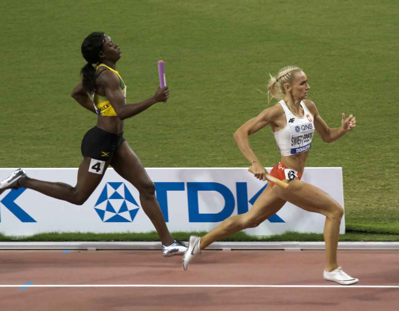 DOH90182 4x400m women final swiety